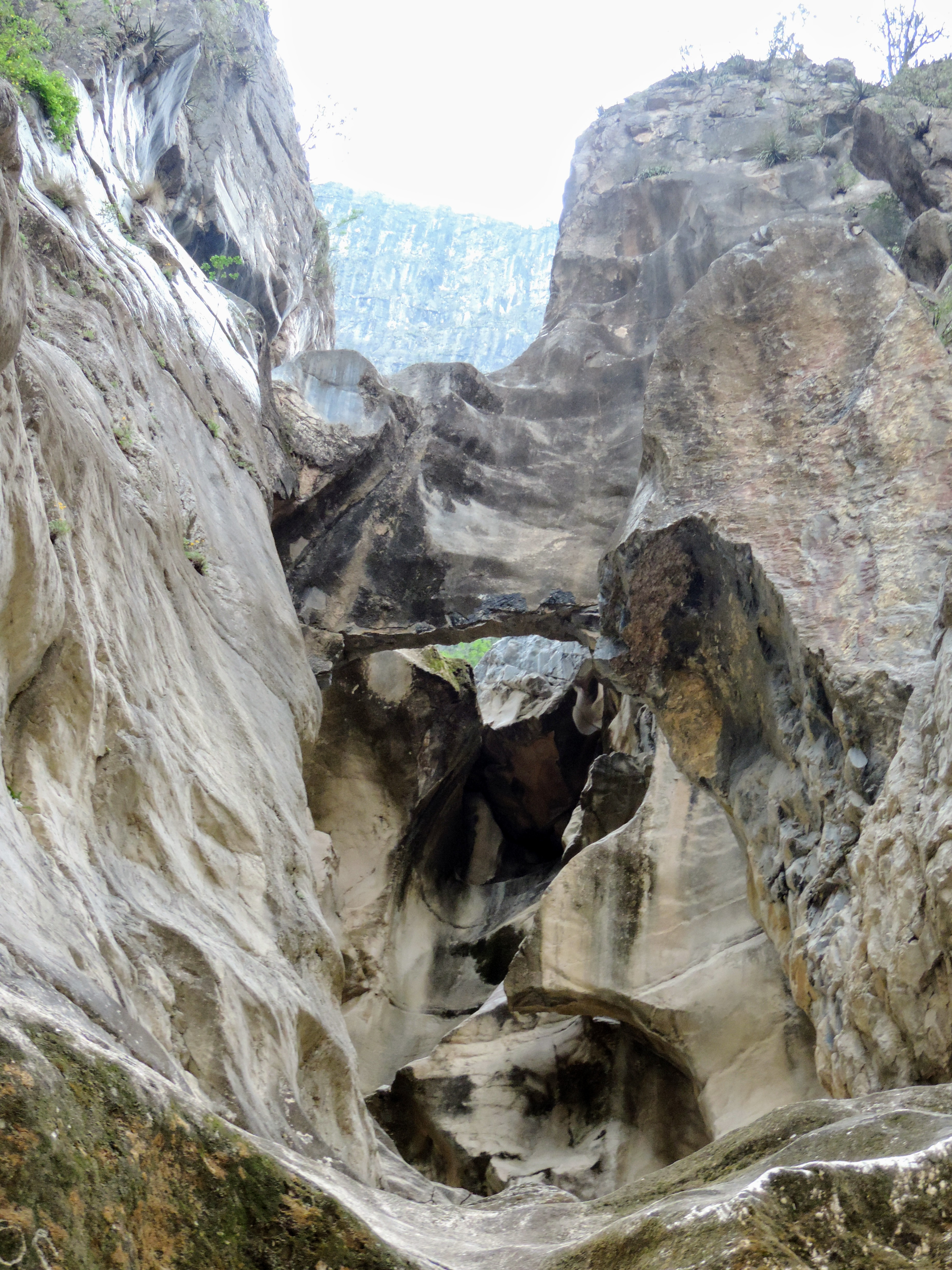 El Salto de Ciénega de González sin agua, desde abajo